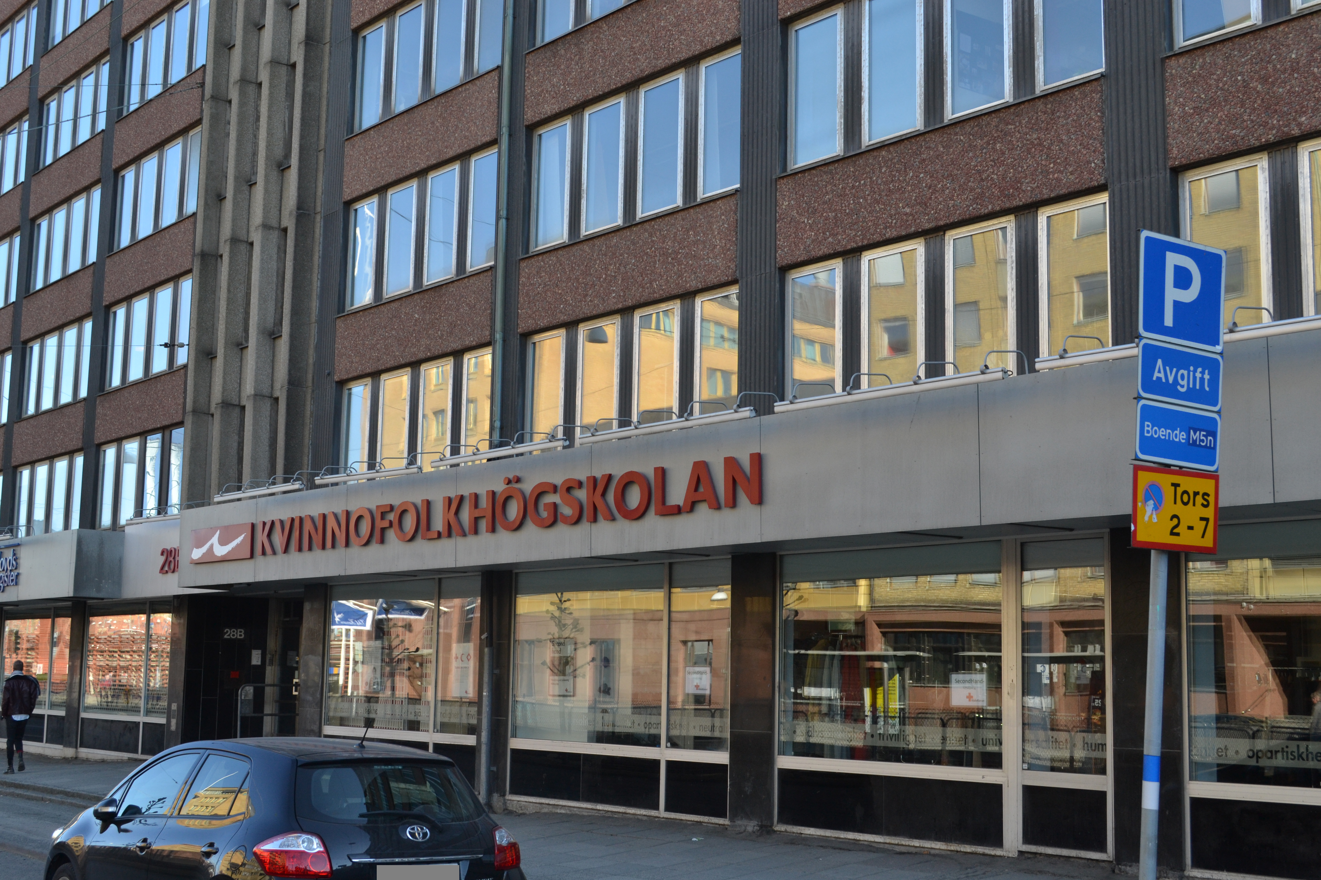 Kvinnofolkhögskolan, Första Långgatan 28C, Göteborg.